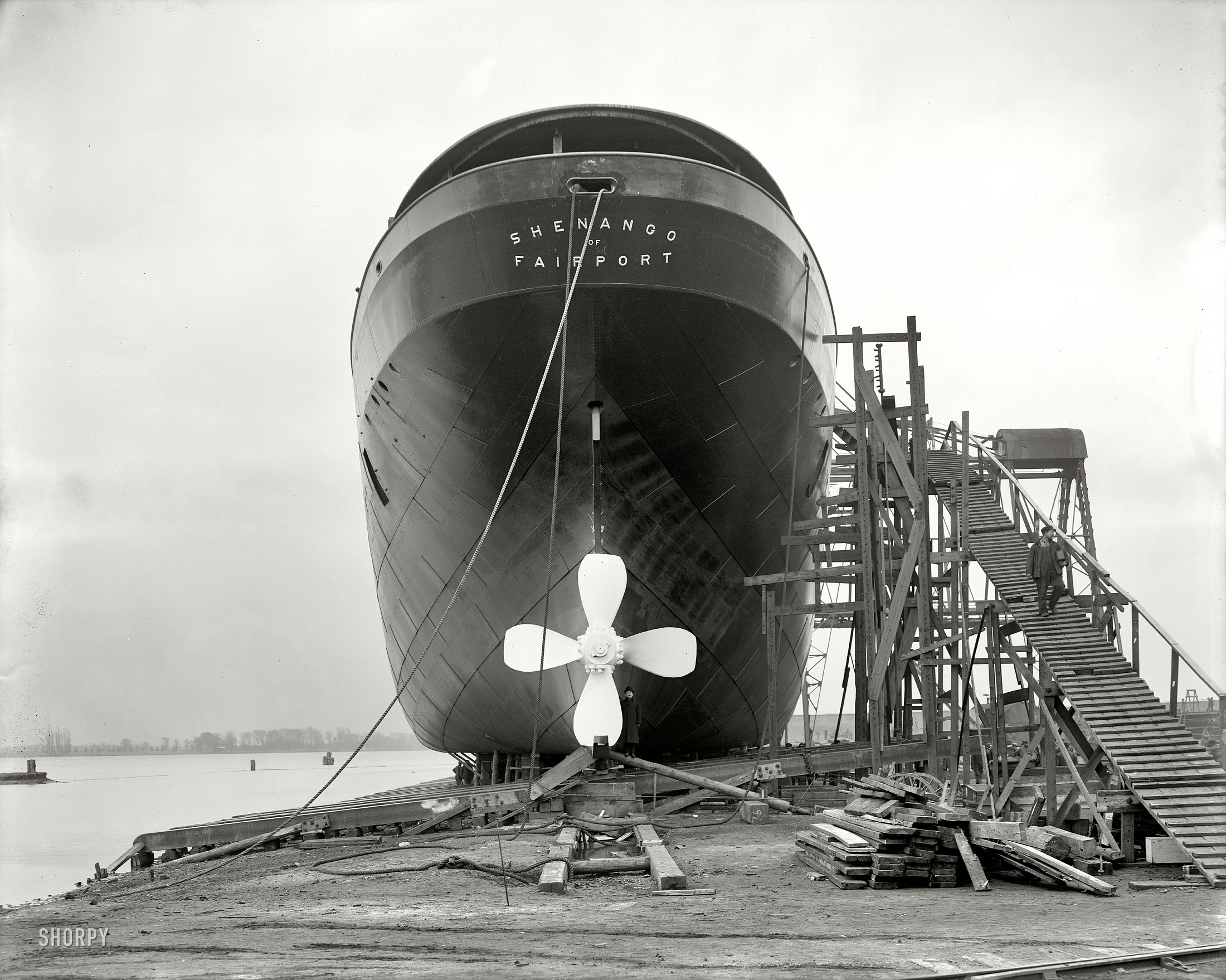 Ecorse Mi 1904